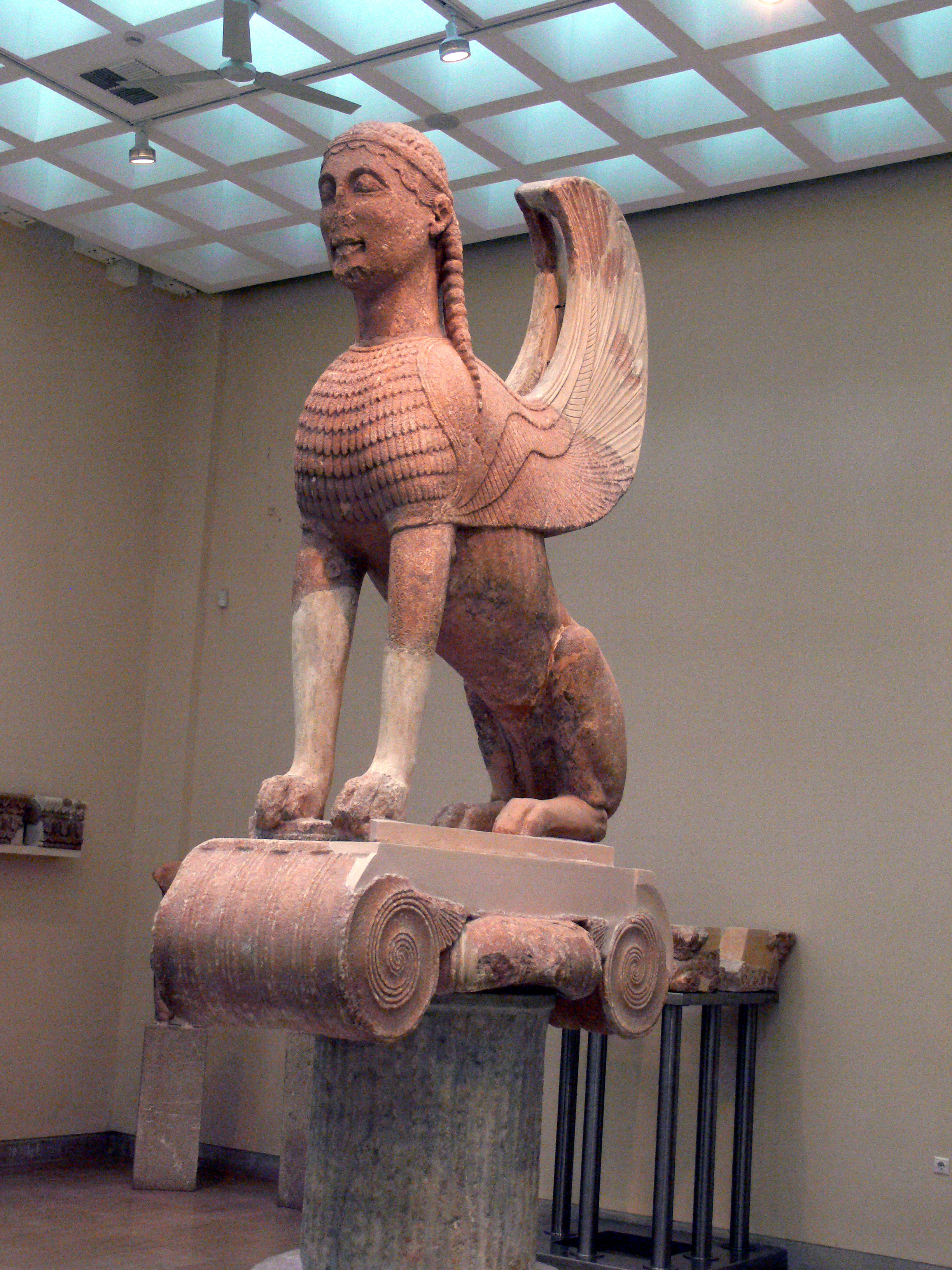 Sphinx im Museum von Delphi